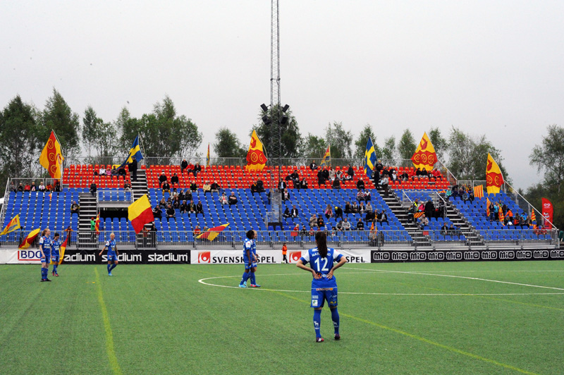 a_6_3832